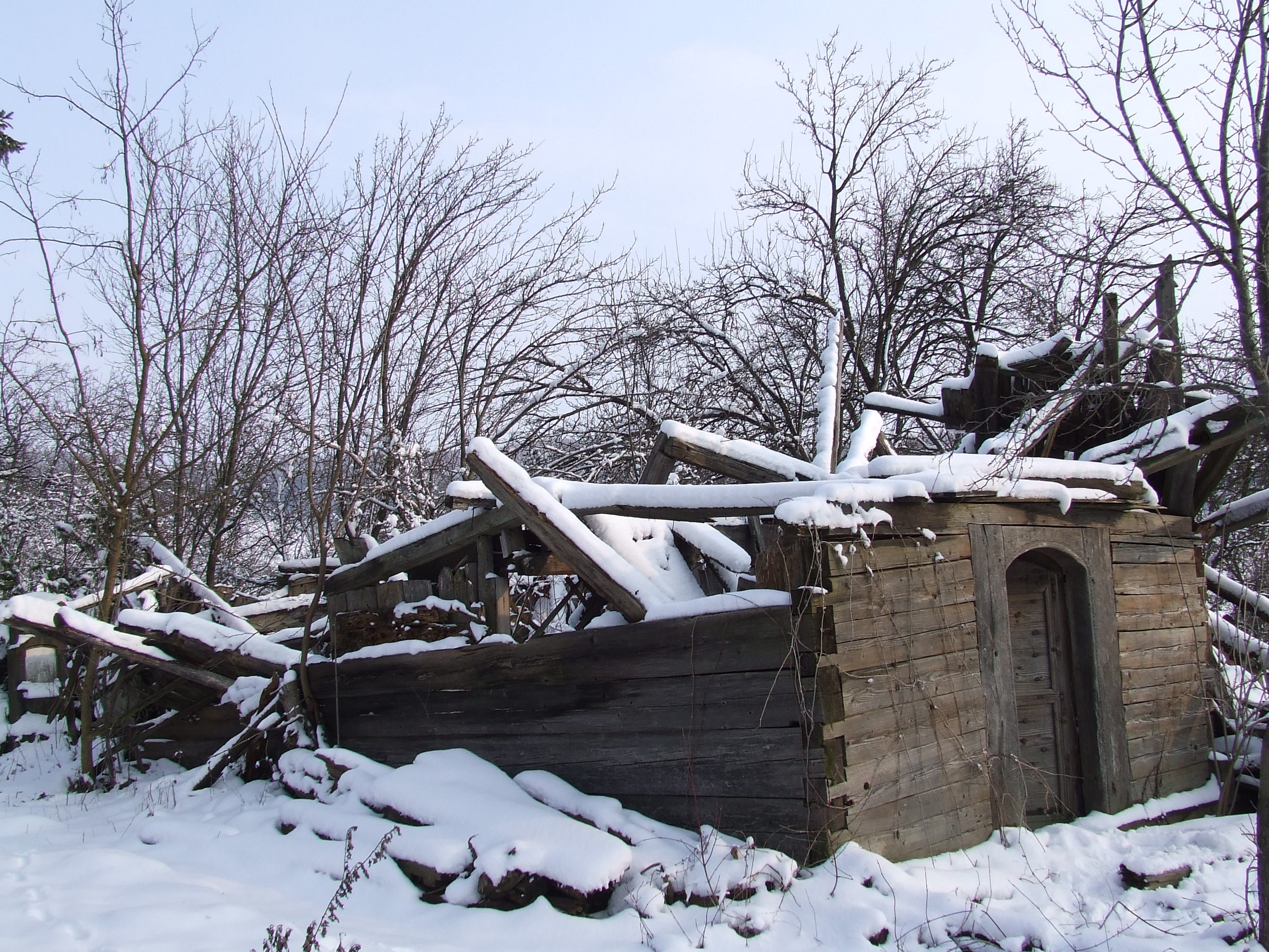 Biserica de lemn din Mura Mare, judeţul Mureş.